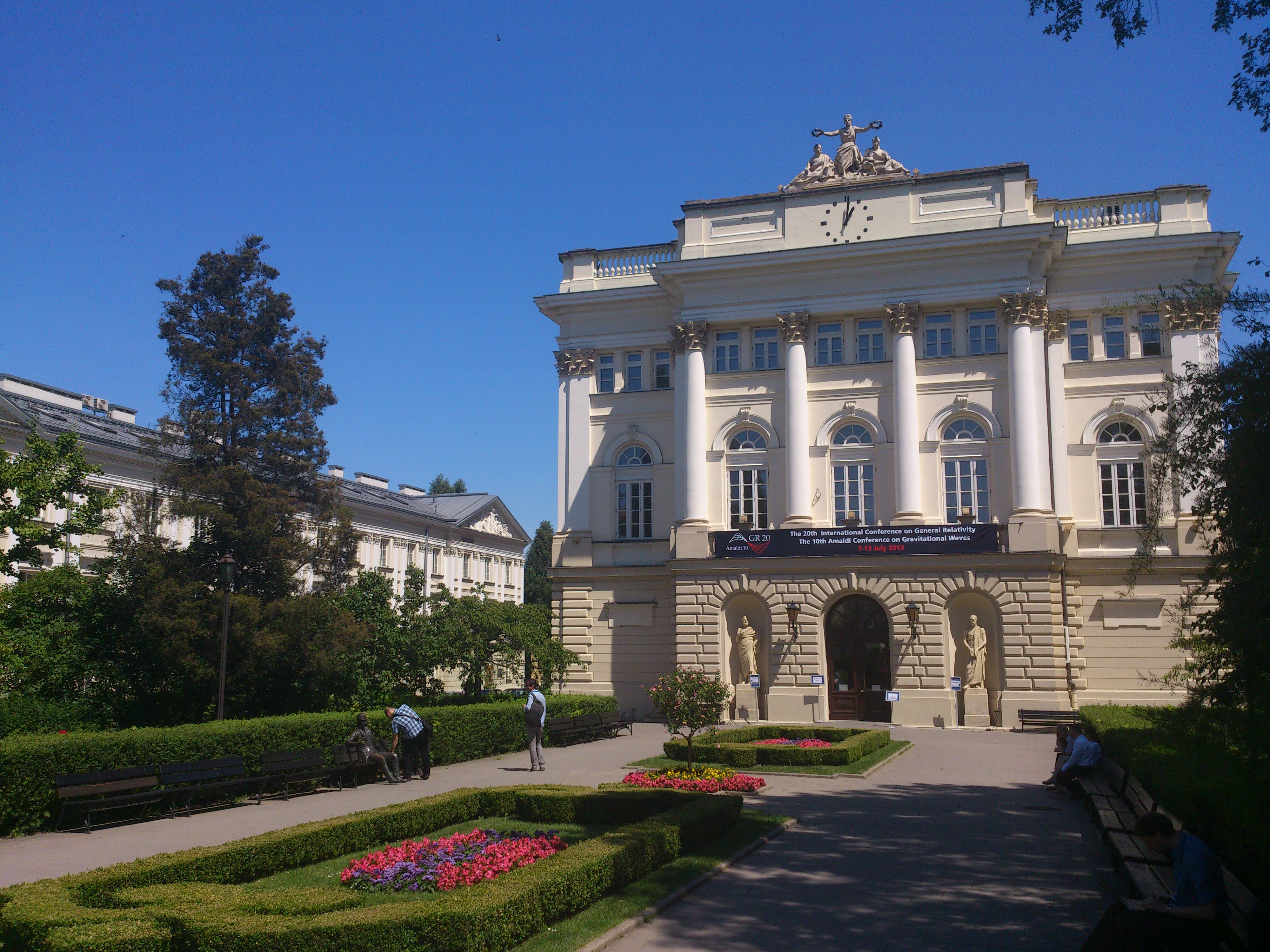 Warszawa, Biblioteka Uniwersytecka, 1891-1894